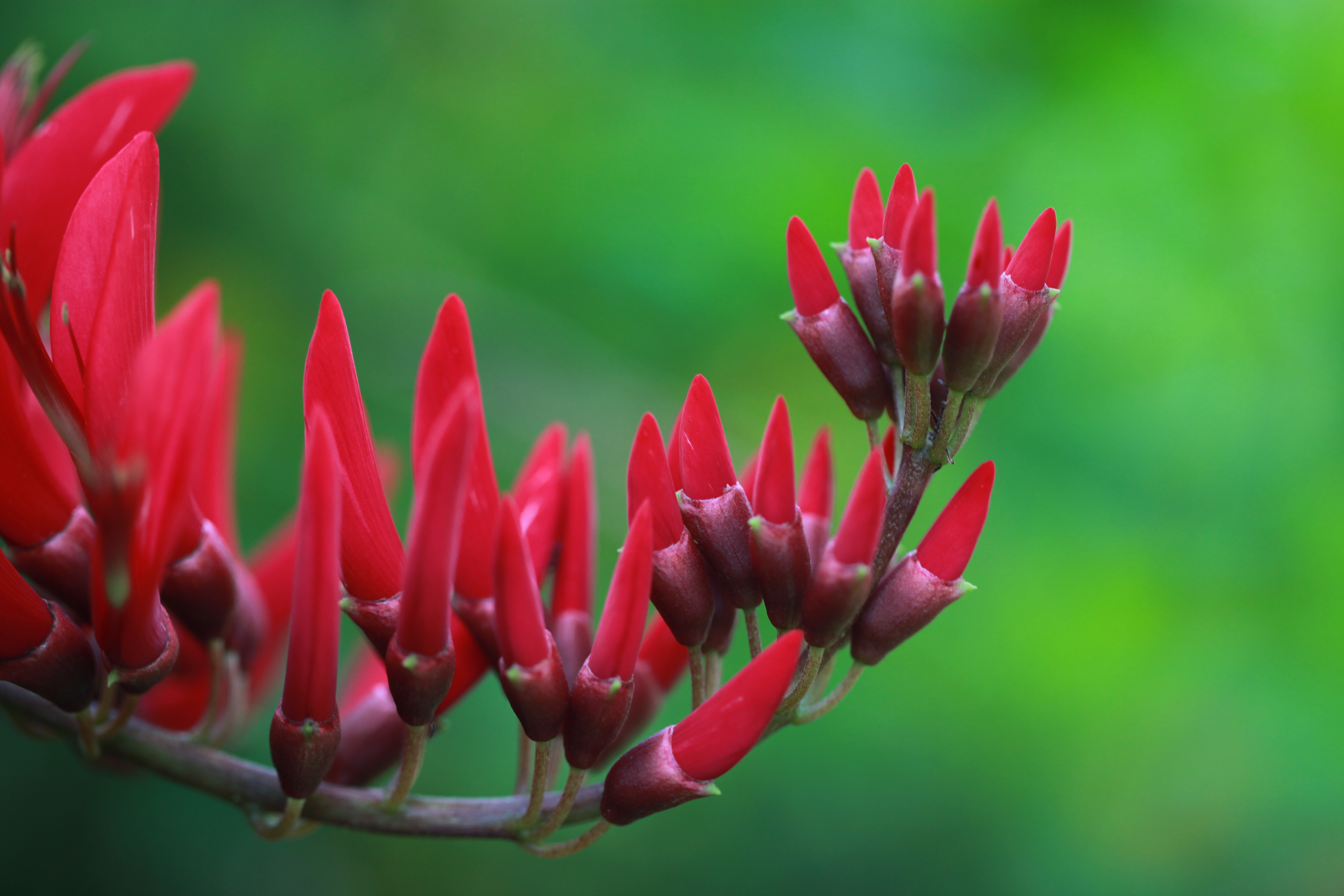 ดอกไม้ประจำคณะสารสนเทศและการสื่อสาร